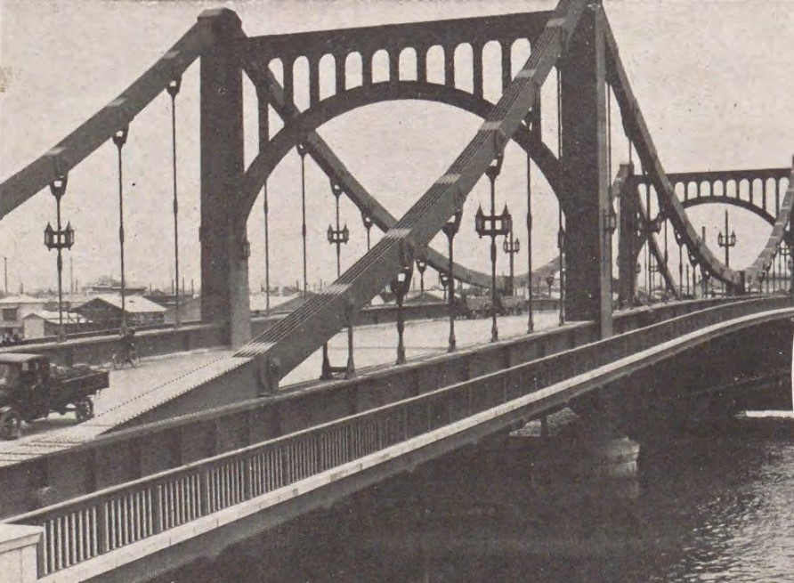 清洲橋。昭和初期